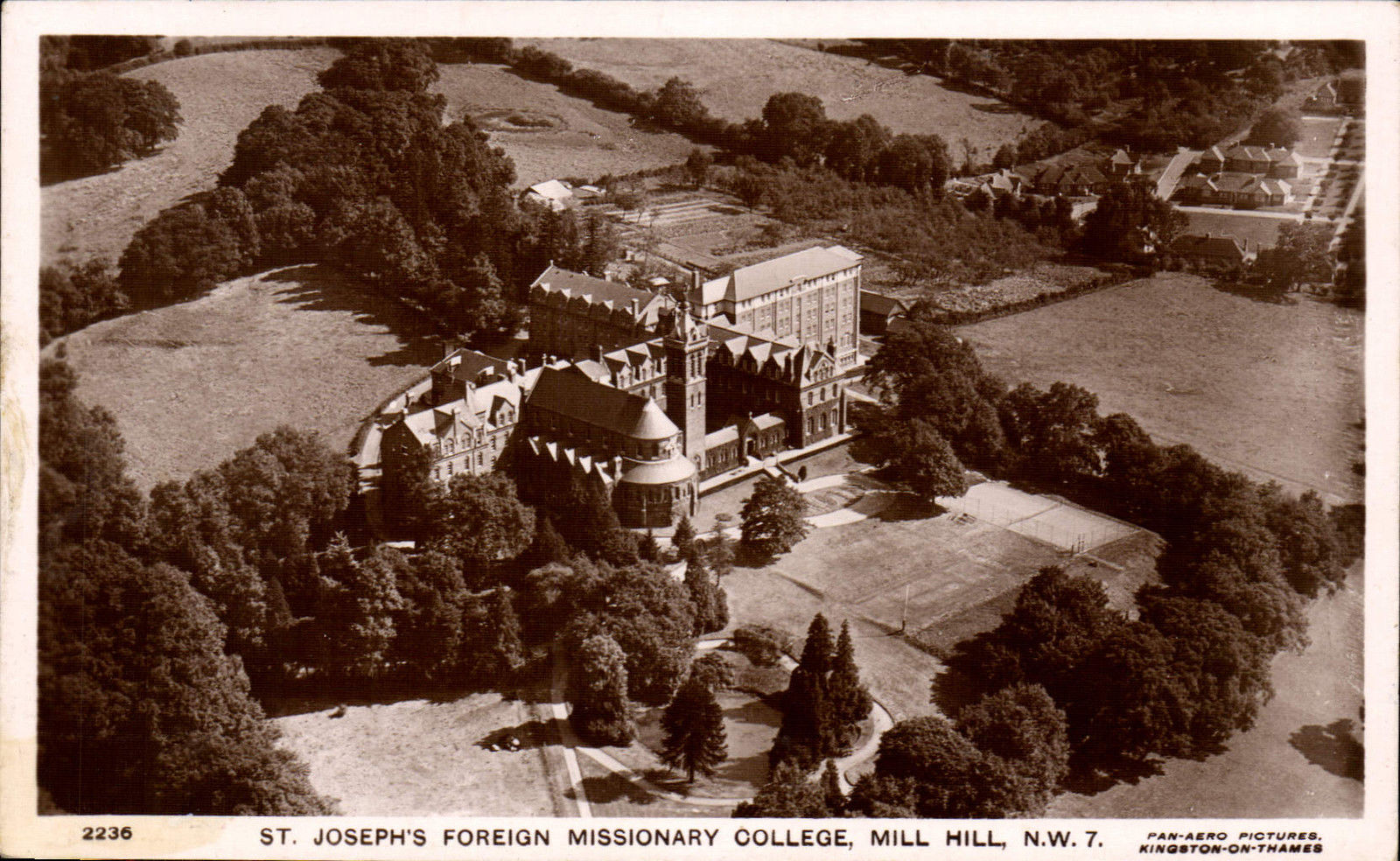 Séminaire et maison-mère de la Société des missionnaires de Mill Hill (Angleterre). Carte postale des années 1940.